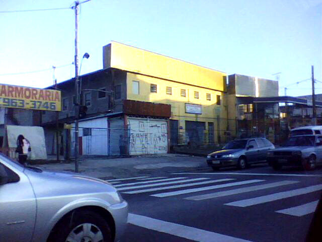 Avenida Marechal Tito, no bairro de Jardim das Oliveiras, no município brasileiro de São Paulo.